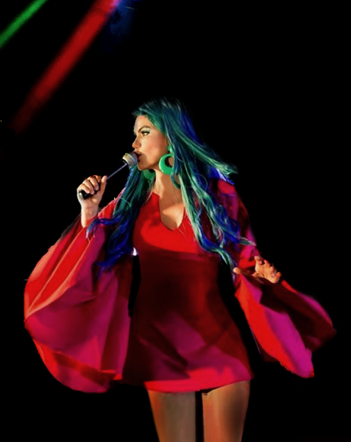 Gilmelândia no Carnaval de 2016.